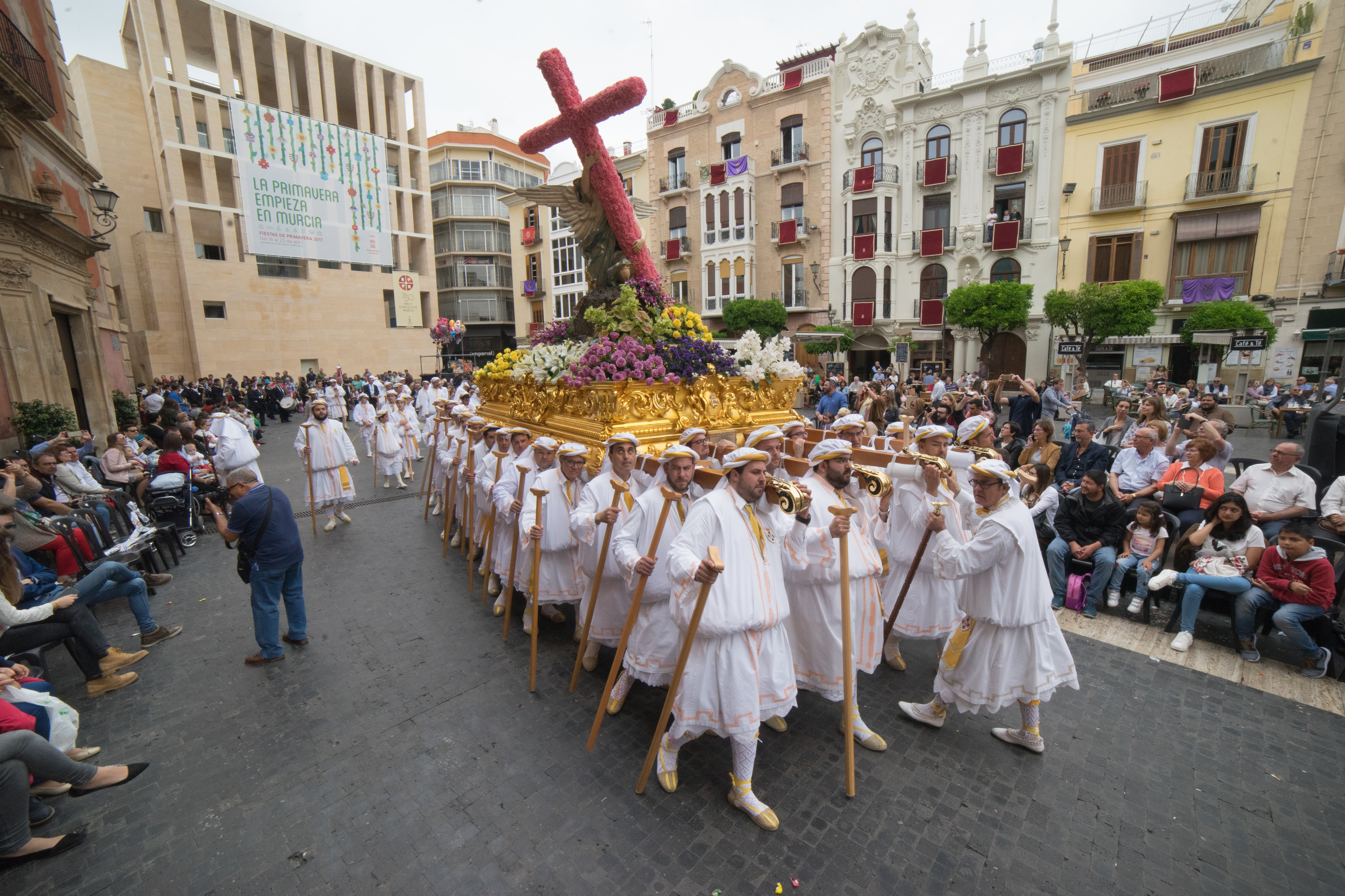 Paso de la Cruz Triunfante. Semana Santa de Murcia. Cofradía del Resucitado. Murcia. This is a photography of a Folklore festival in Spain (Wikidata id Q5685566).